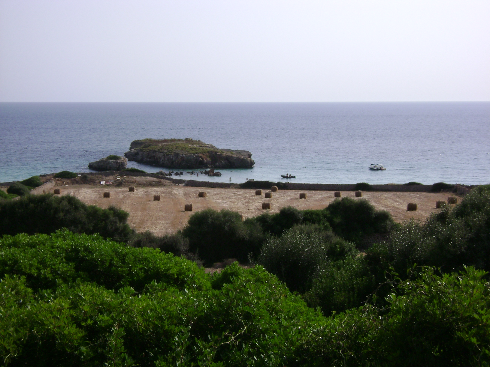 un aspect de la côte sud de l'île